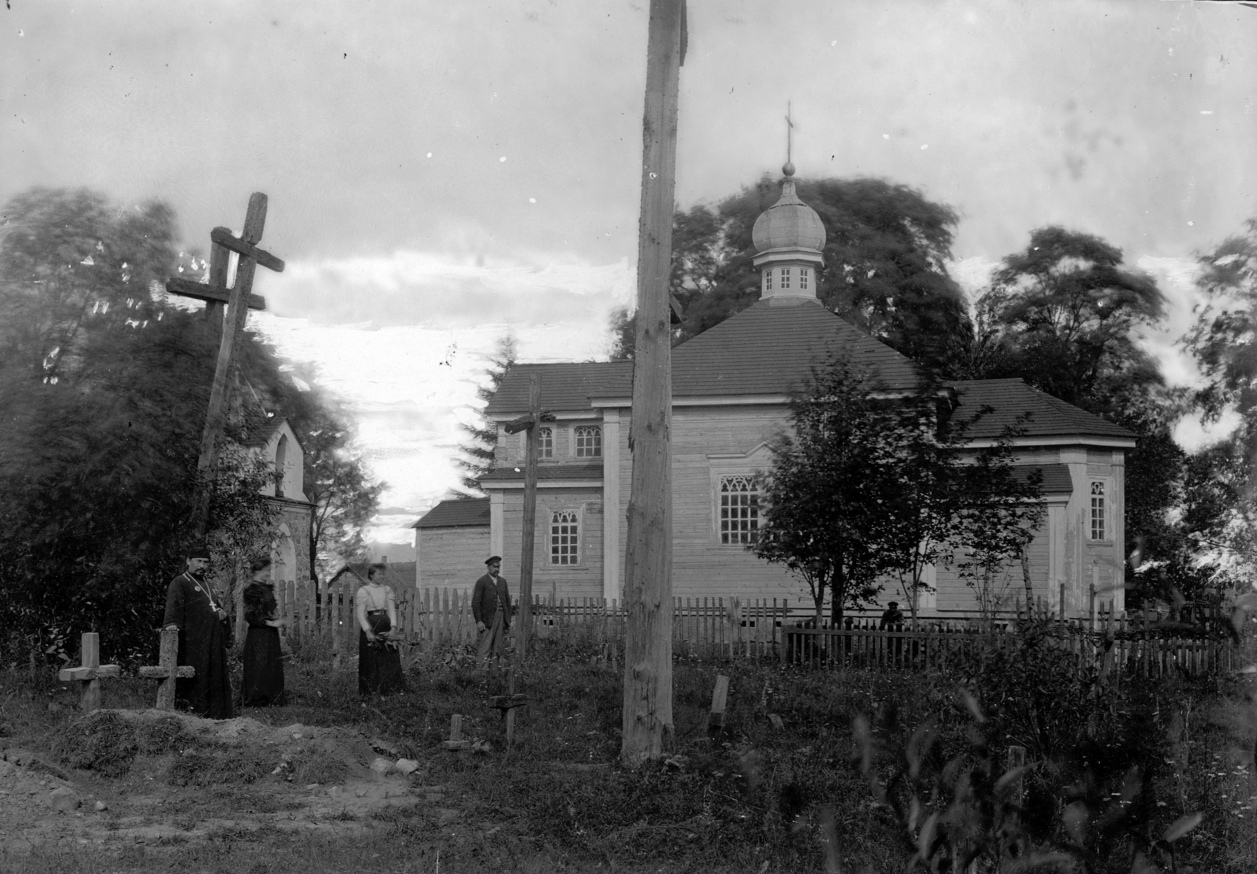 Беларуская (тарашкевіца): Дзяляцічы (Dzialacičy). Узьвіжанская царква